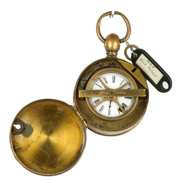 Tragbare Waechterkontrolluhr "Buerk Patent", Wuerttembergische Uhrenfabrik, Schwenningen, um 1860 (Deutsches Uhrenmuseum, Inv. 2007-109)